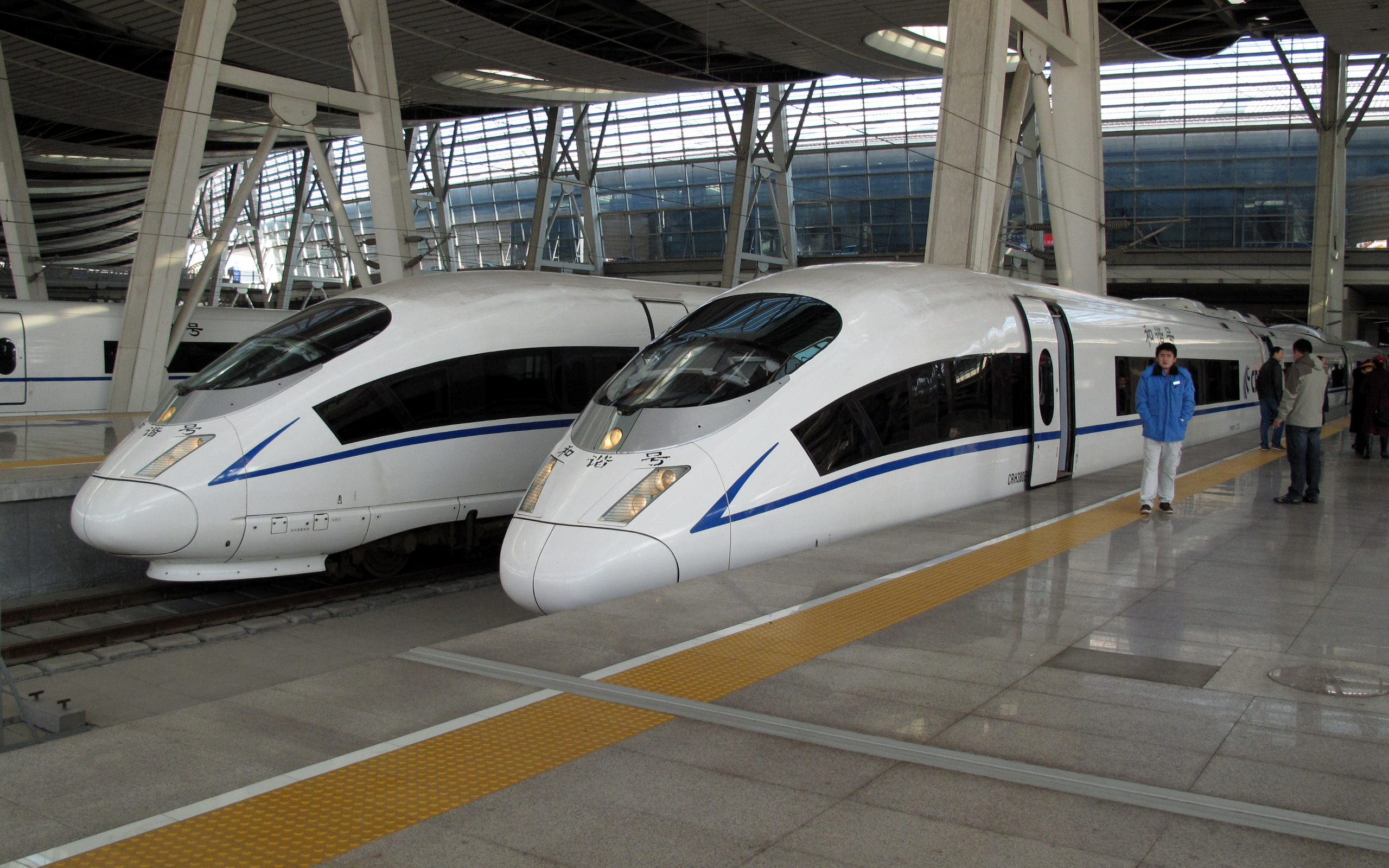 中文（中国大陆）: 运用于京沪高铁的CRH380BL在北京南站